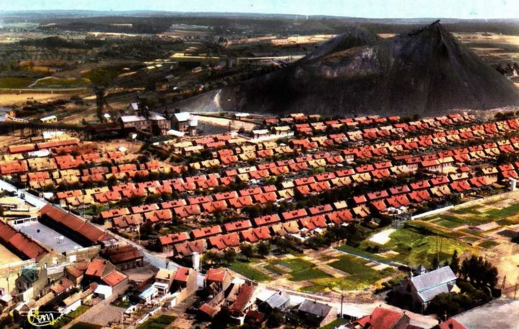 La Fosse n° 6 bis - 6 ter de la Compagnie des mines de Marles était un charbonnage constitué de deux puits situé à Calonne-Ricouart, Pas-de-Calais, Nord-Pas-de-Calais, France. La photographie présente une vue aérienne en photochrome des puits n° 6 bis et 6 ter. Le puits n° 6 se trouve plus au sud, non visible sur l'image, à droite de l'église.